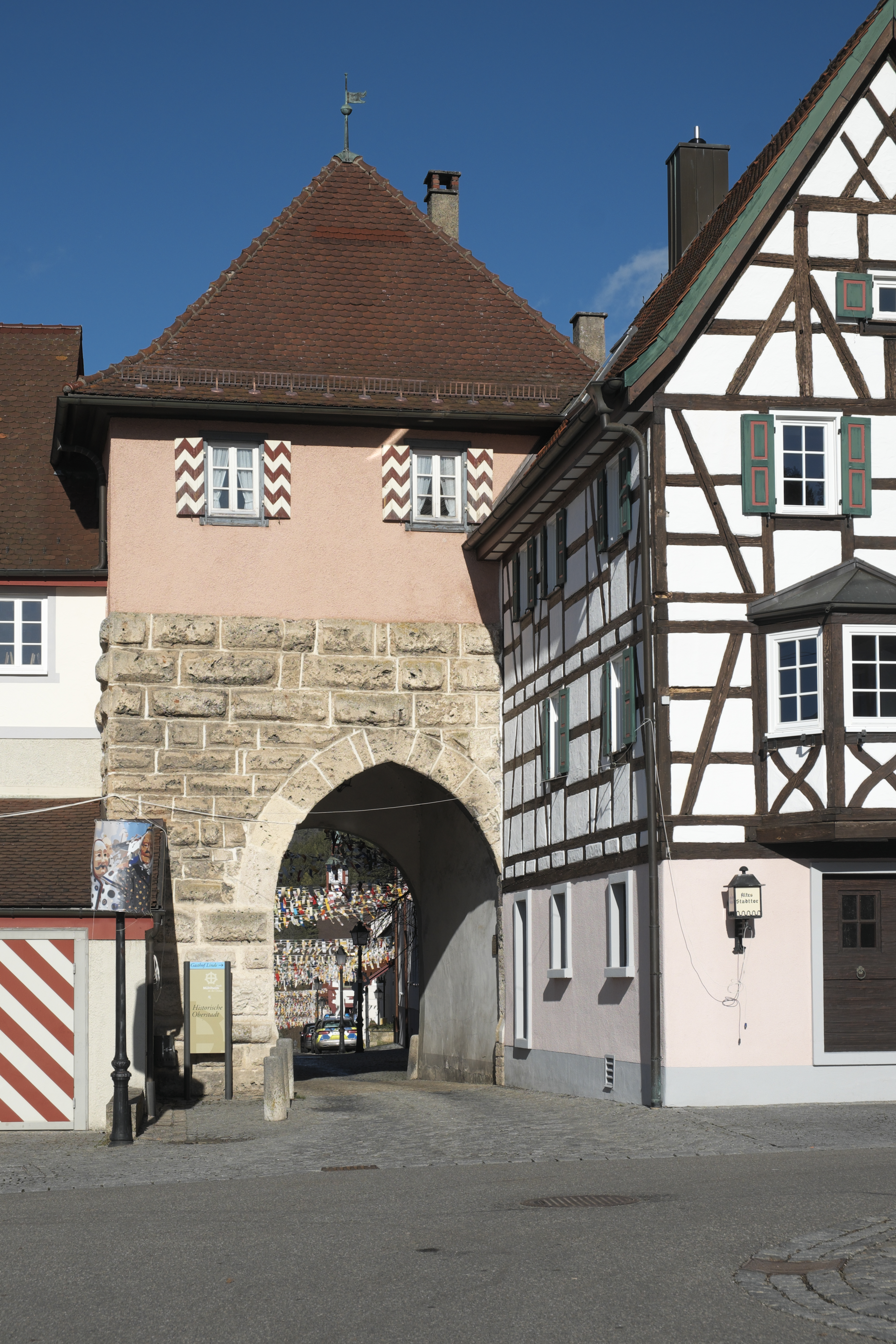 Oberes Tor in Mühlheim an der Donau im Landkreis Tuttlingen (Baden-Württemberg/Deutschland)